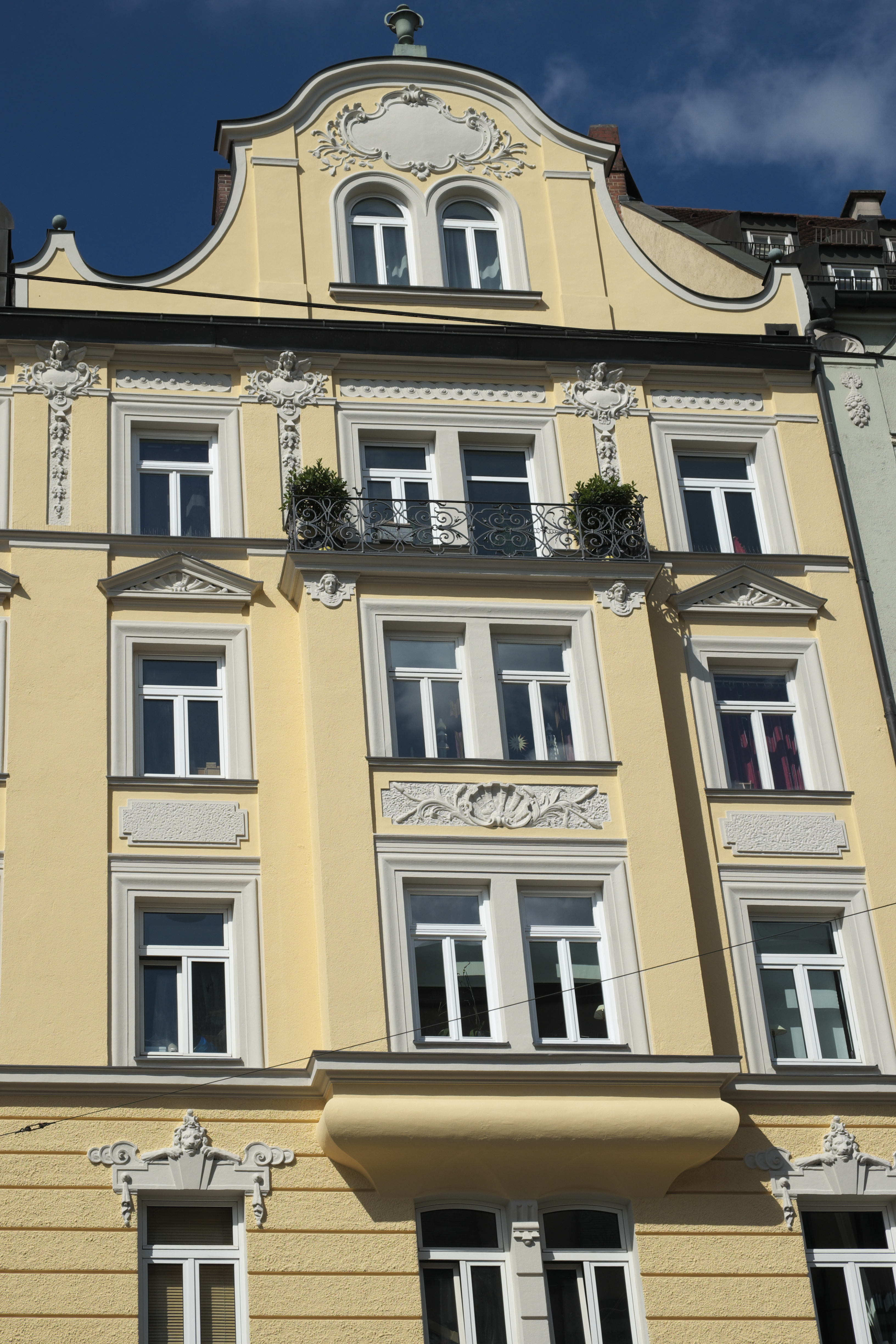 Mietshaus in der Zweibrückenstraße 10 in der Isarvorstadt im Stadtbezirk Ludwigsvorstadt-Isarvorstadt in München (Bayern/Deutschland), 1892–93 von Hugo Dreier gebaut